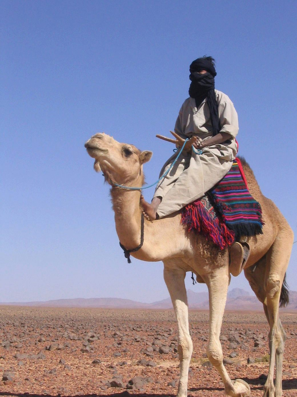 Chamelier sur son méhari dans le Hoggar.